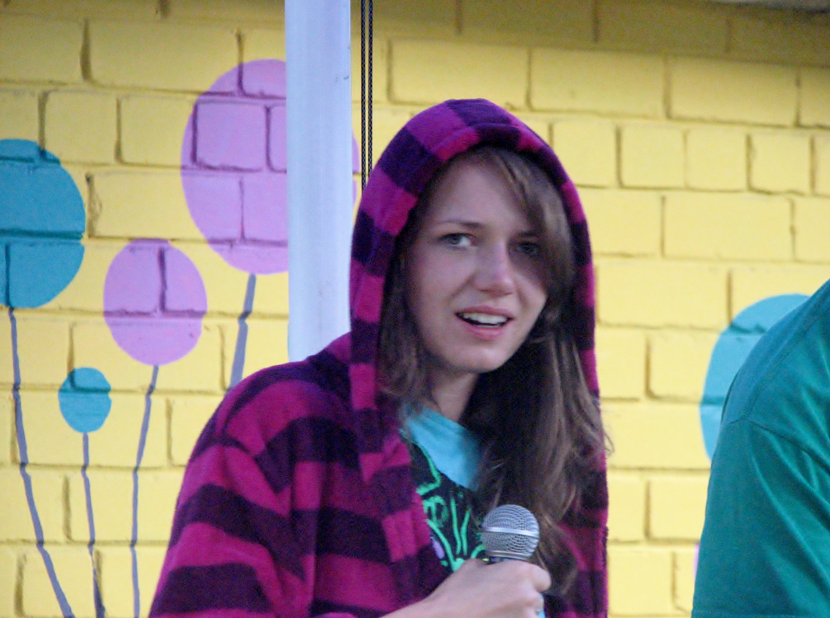 Elerin Velling esinemas duo Sädelev Kass koosseisus Uue Maailma tänavafestivalil